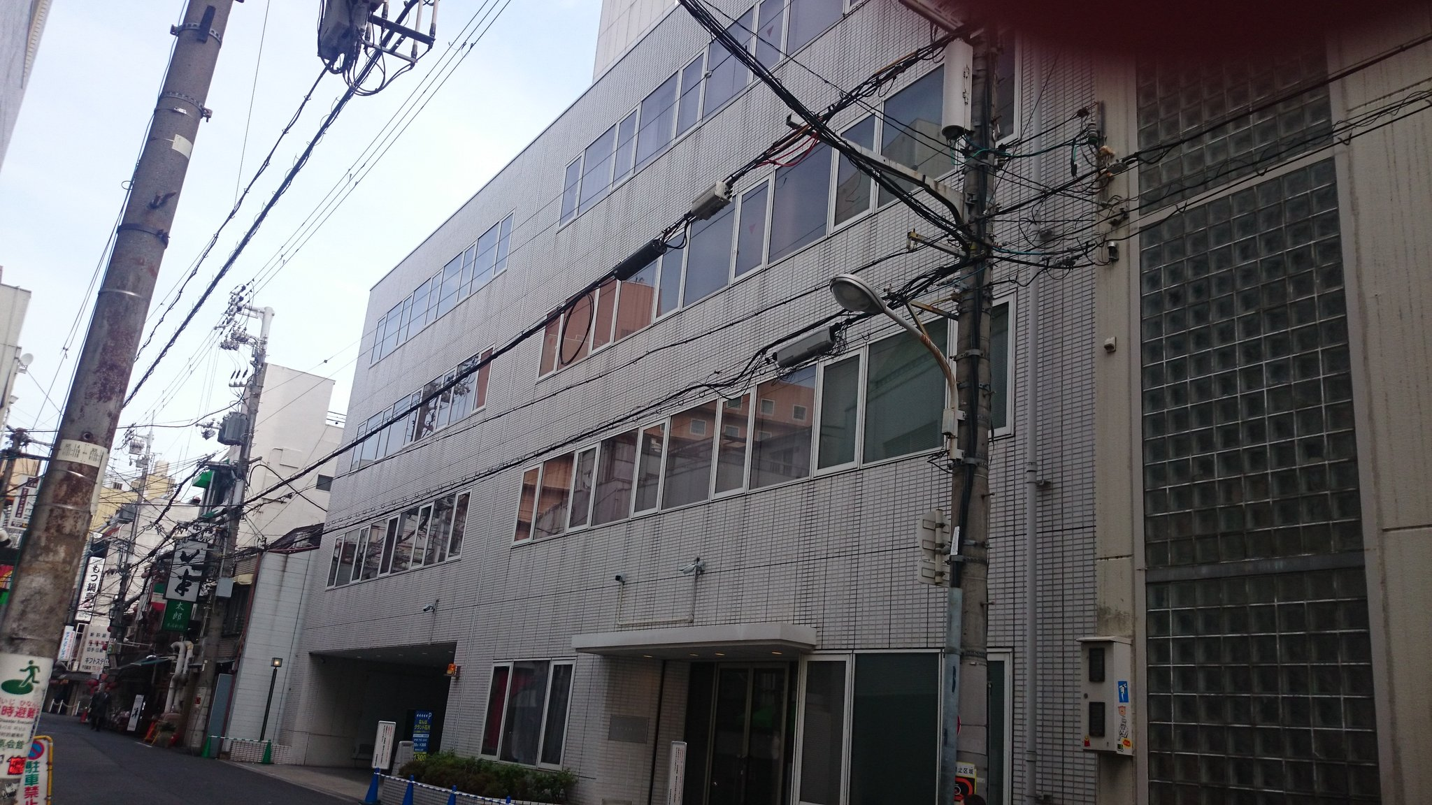 私が撮影しました。